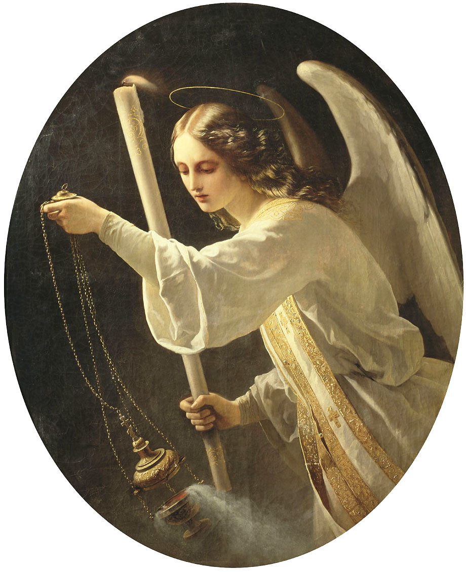 The Angellabel QS:Les,"Angel" label QS:Lfr,"Ange" label QS:Len,"The Angel" label QS:Lde,"Engel" label QS:Lru,"Ангел"